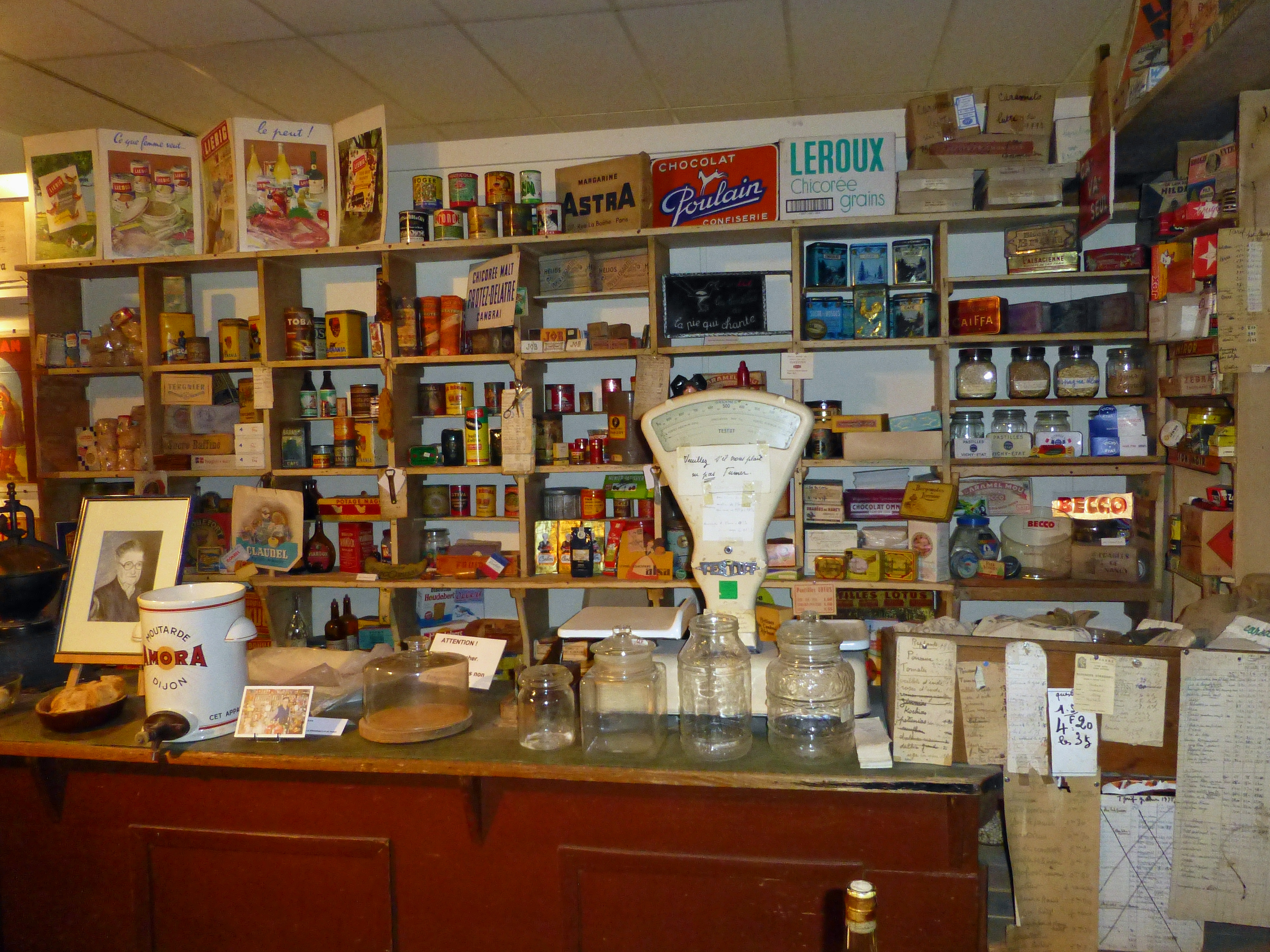 Saint-Dié-des-Vosges, musée Pierre-Noël : reconstitution d'une ancienne épicerie